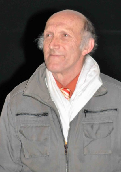 Rufus à l'avant-première du film "Liberté"